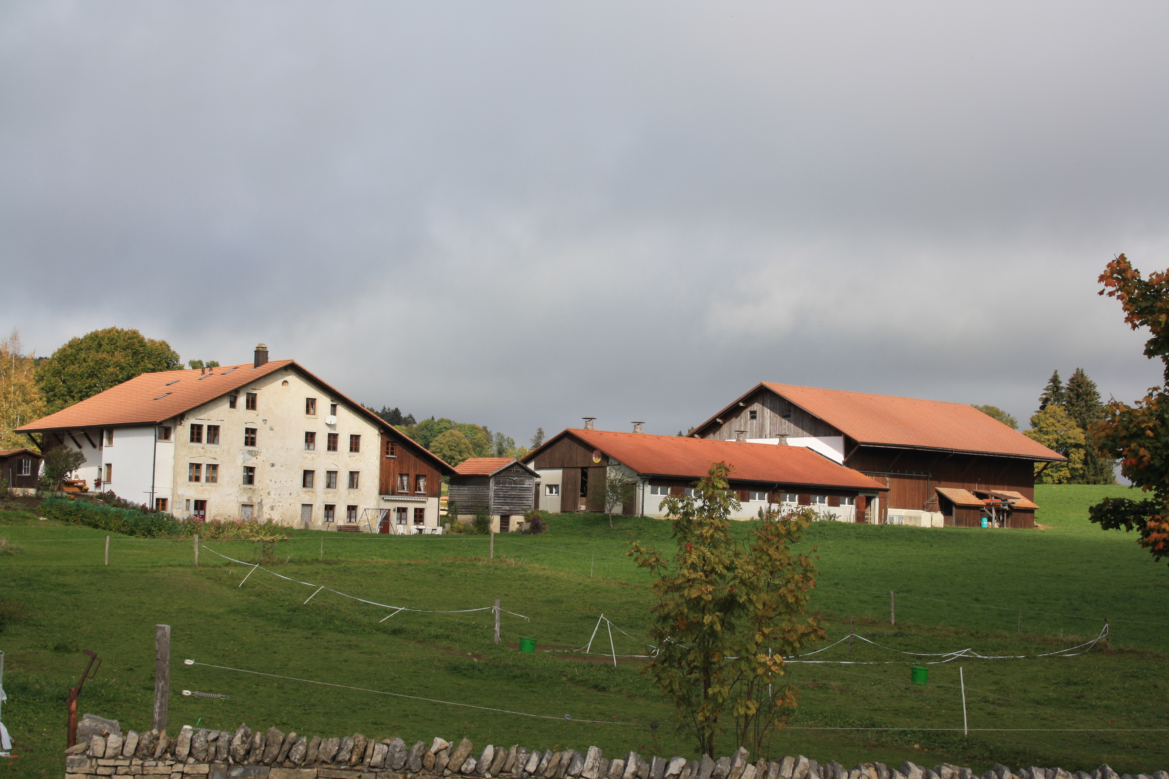 Les Breuleux